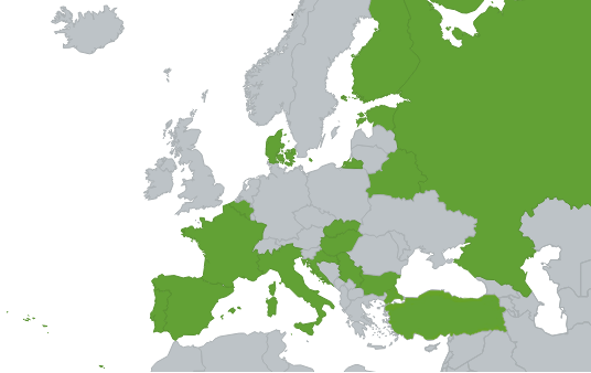 Aktuelle Europäische Karte 2018 mit den Mitgliedsländern, welche die Bogenjagd bereits erlaubt haben.